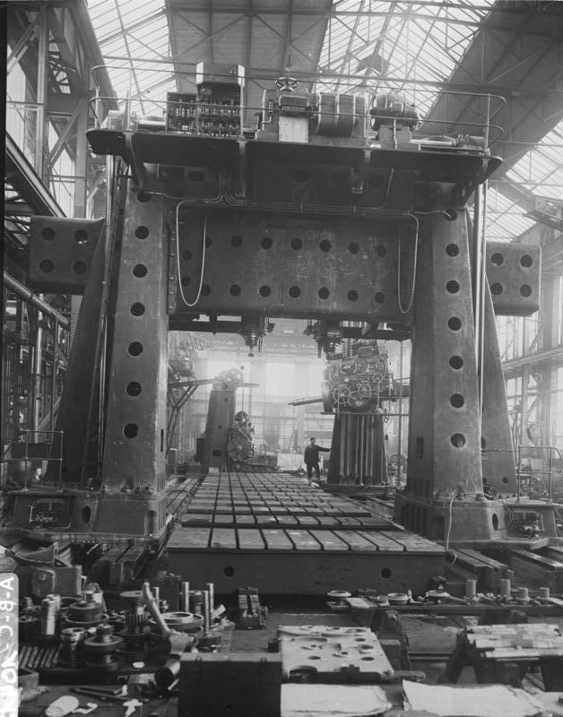 Ein Riesenwerk deutscher Technik! Durchblick durch ein Portal-Fräswerk zur Bearbeitung grosser Werkstücke. Dieser Maschinenriese ist imstande, Werkstücke bis 4,5m Breite und Höhe, wie einer Länge von 24m aufzunehmen und zu bearbeiten. Dieses gigantische Werk, ein Erzeugnis der Firma Schiess Defries, steht einzig in der Welt da.